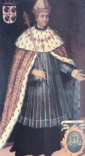 Còpia de 1634 del retrat imaginari del rei Ramir II d'Aragó (1086-1157)